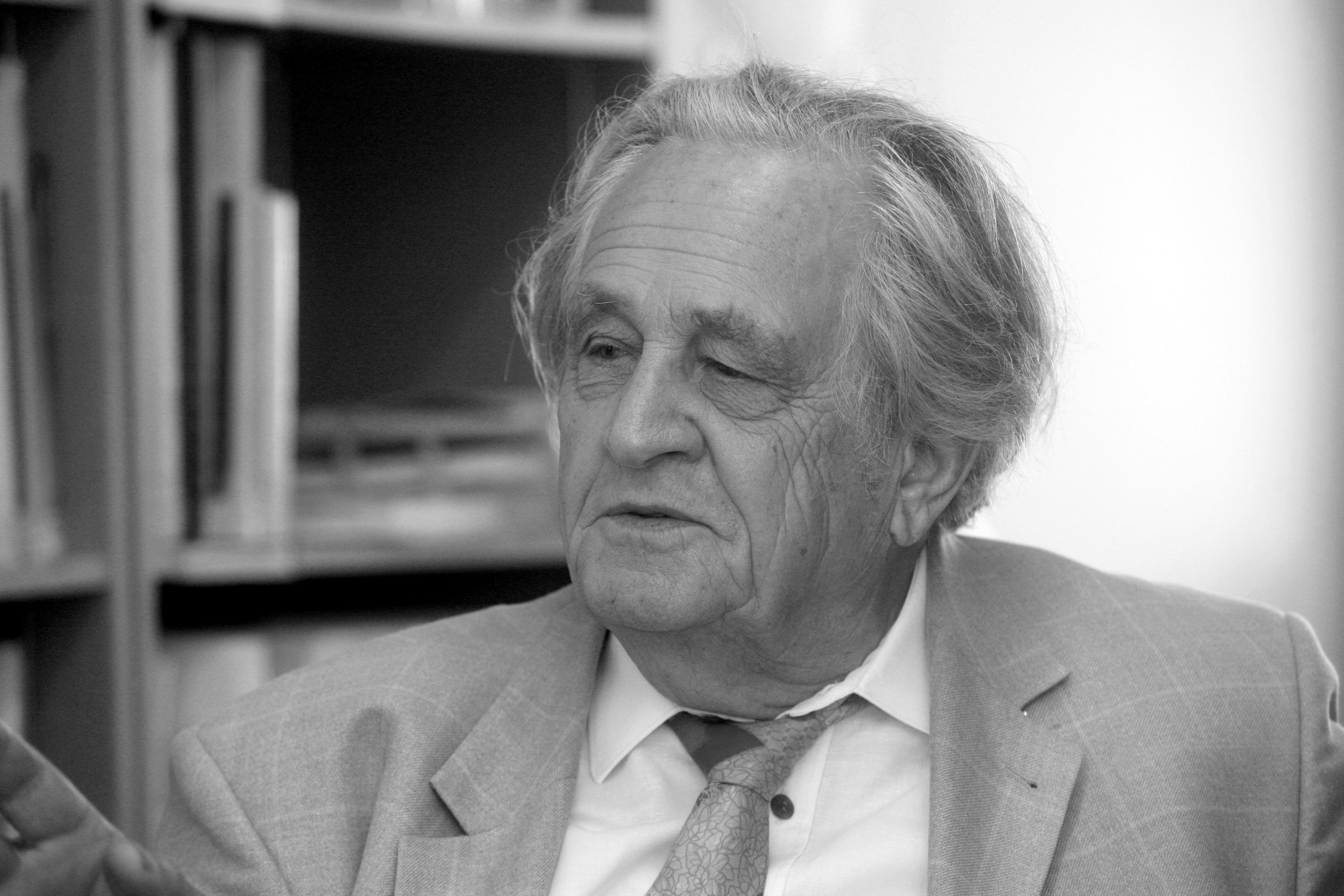 Böhme im Gespräch mit "Forschung Frankfurt" im Jahr 2007